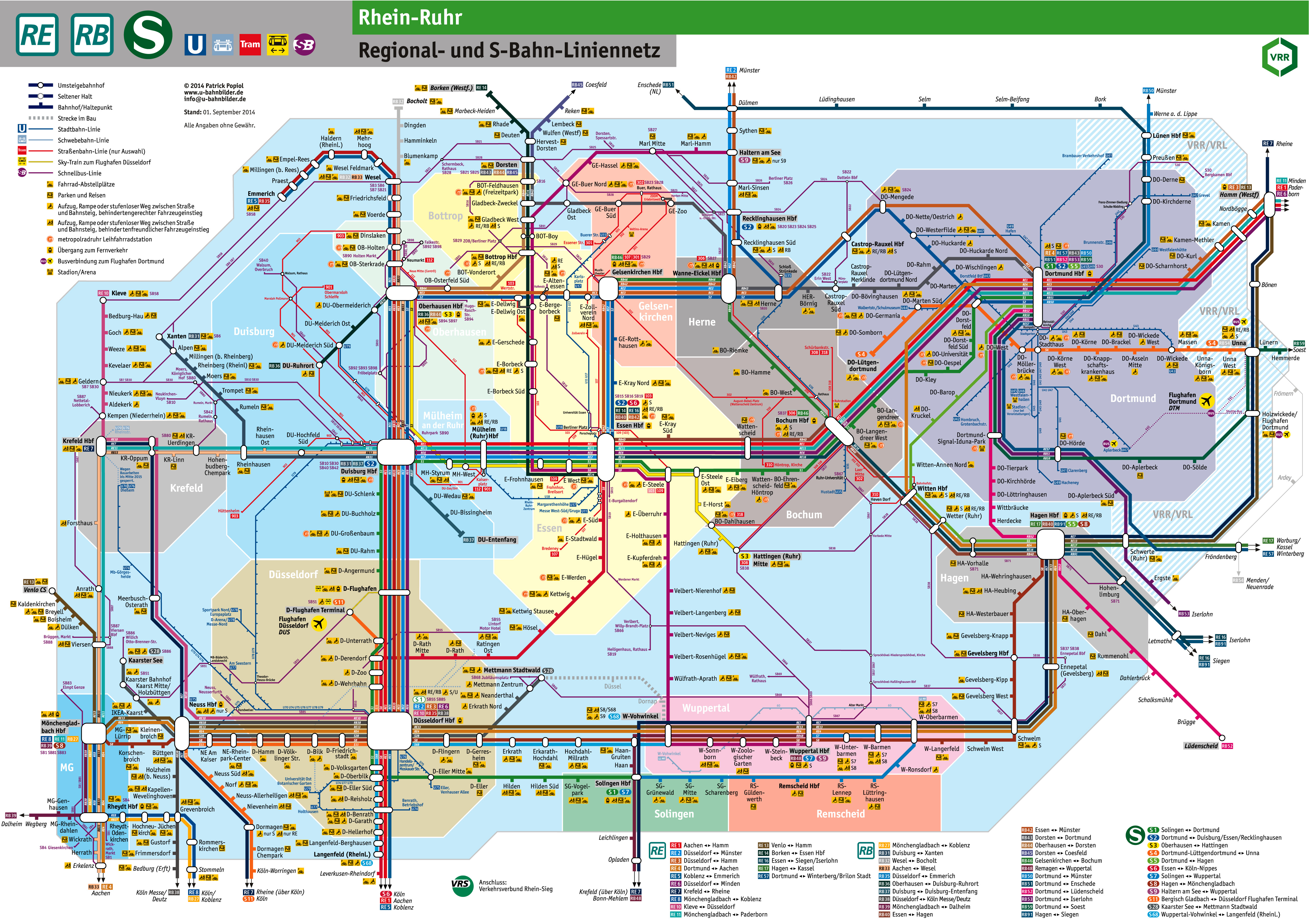 VRR Linien-Netz